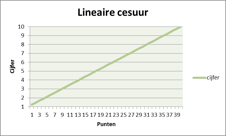 Grafiek bij lineaire cesuur